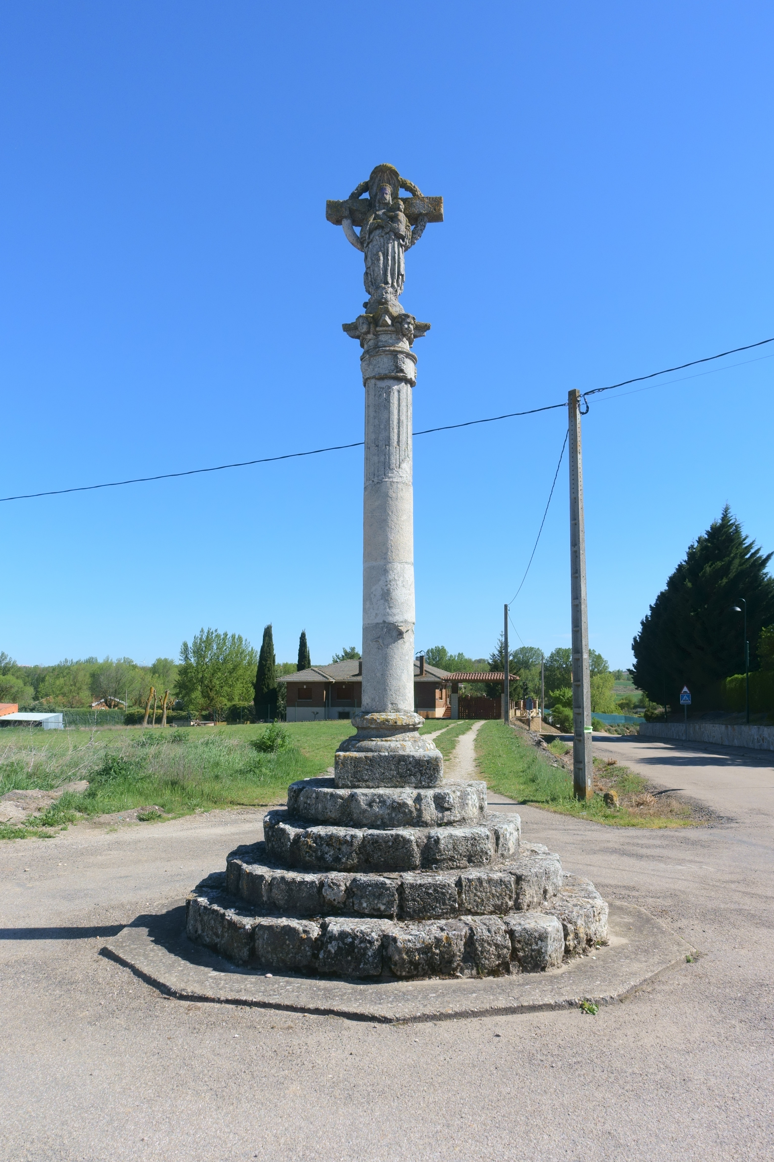 Crucero en Villariezo (Burgos, España).